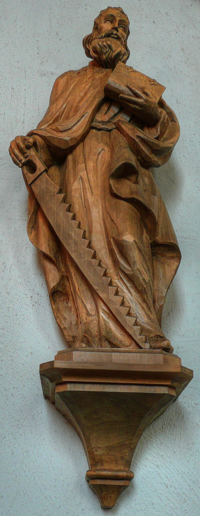 Holzplastik des Hl. Simon im Ühledömche